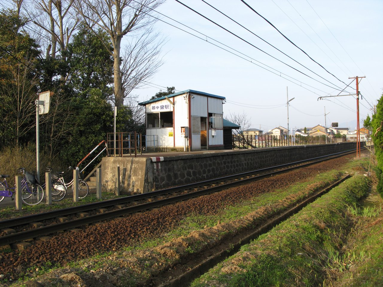 越中泉駅